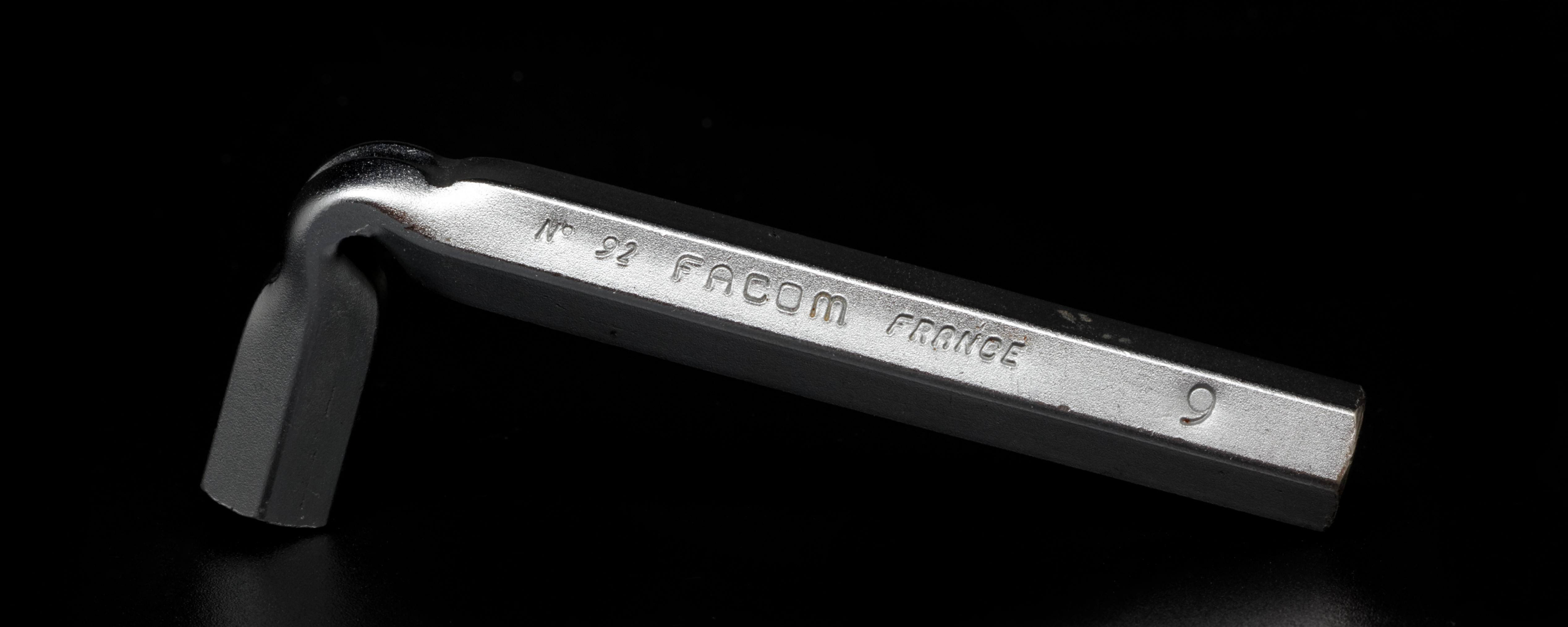 Clé à tube FACOM 9